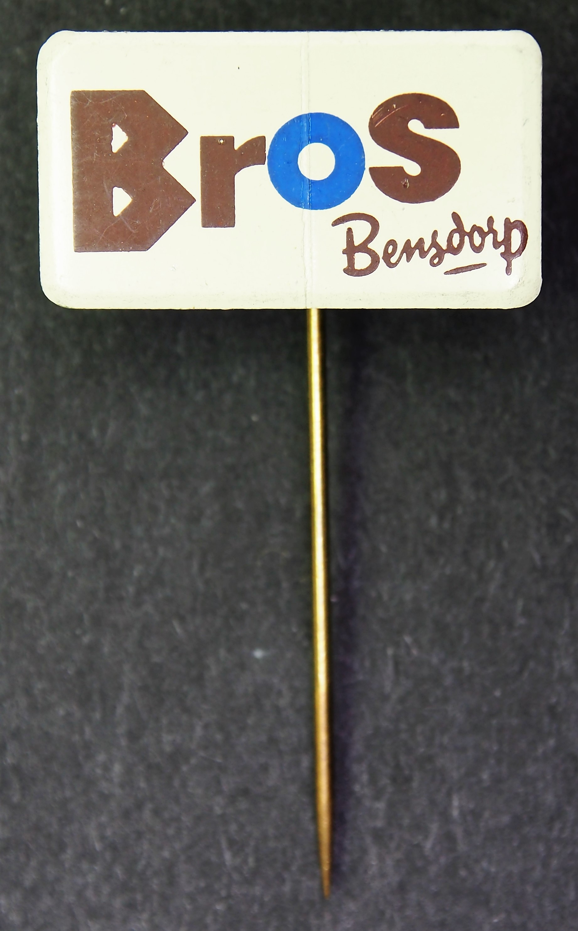 Reclamespeldje van een oud Nederlands product.